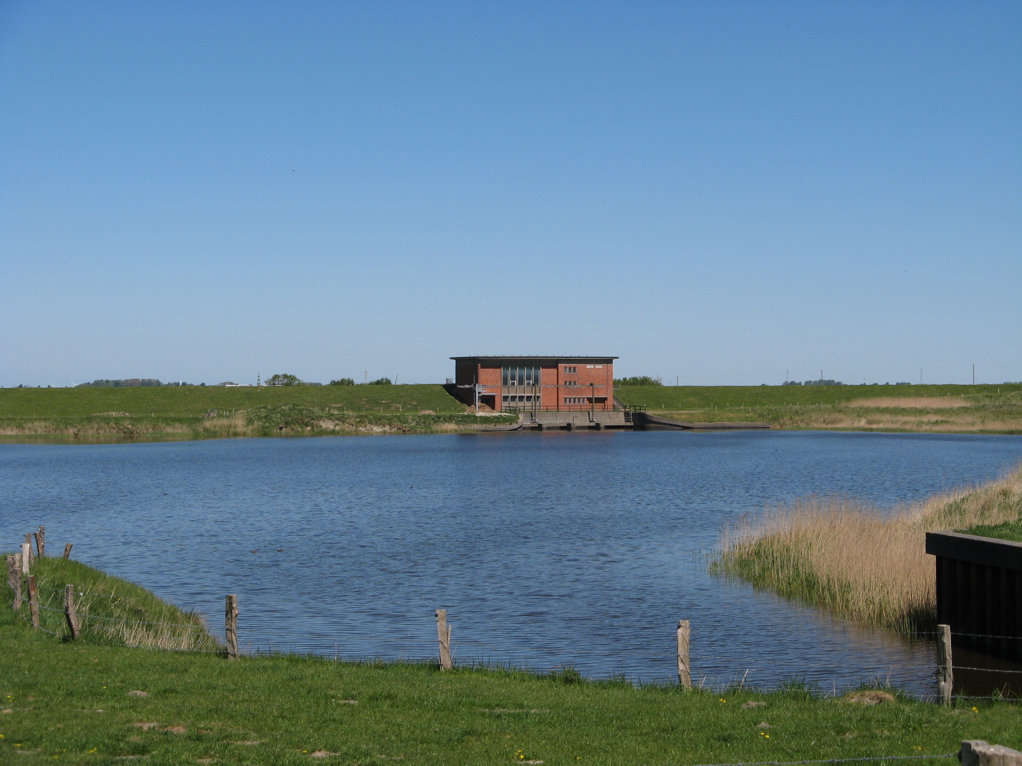 Siel Schülperneuensiel Author: Dirk Ingo Franke